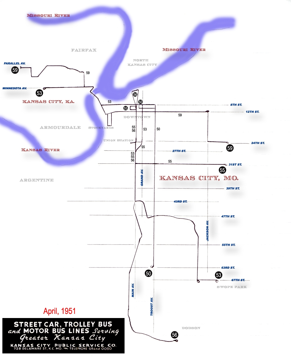 Zelfgetekende media, bewerkt in Photoshop CS